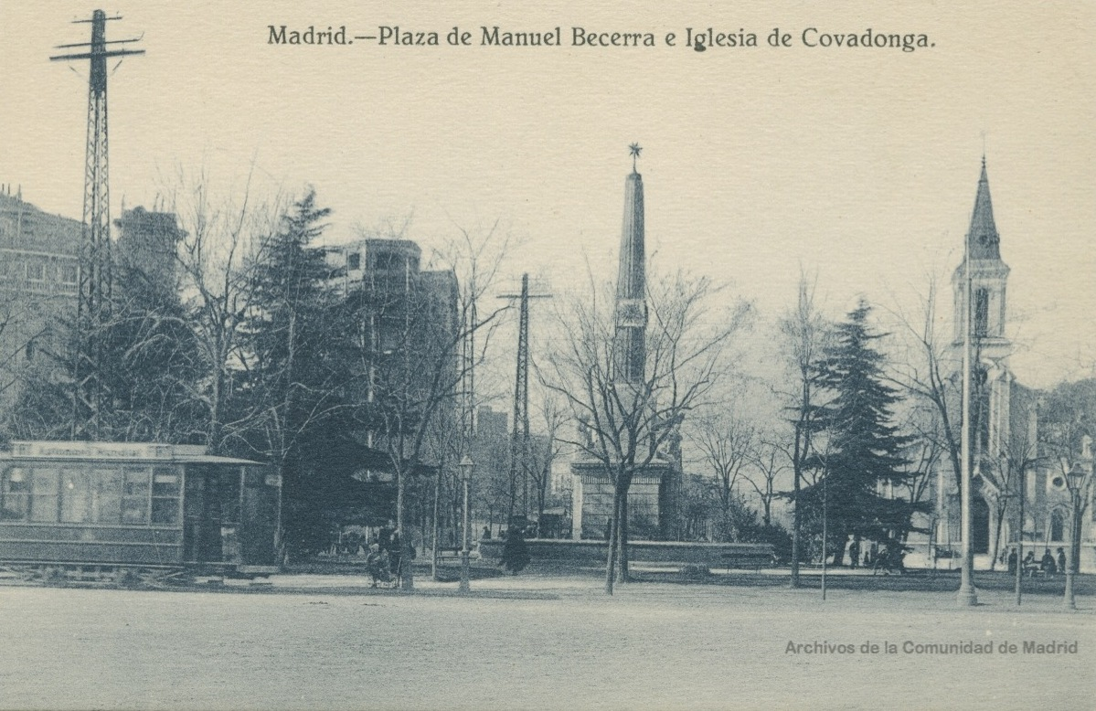 Postal de la Fuente Castellana. Colocada inicialmente a la altura de la que luego sería plaza de Emilio Castelar en el también renombrado paseo de la Castellana, pasó en 1914 a la plaza de Manuel Becerra donde permaneció poco más de medio siglo. En 1970 se trasladó al parque de la Arganzuela, junto al río Manzanares. En su primera ubicación recogía en su pilón el caudal de aguas del arroyo de la Fuente Castellana.